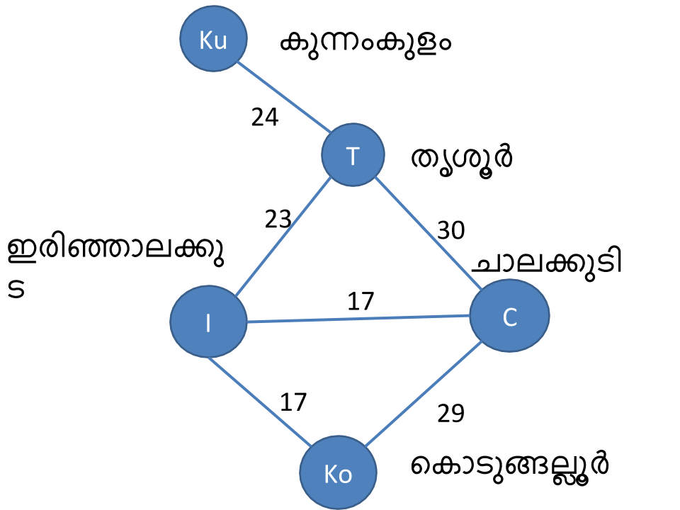 കേരളത്തിലെ ചില നഗരങ്ങൾ തമ്മിലുള്ള റോഡ് ബന്ധം കാണിയ്ക്കുന്ന ലേഖ, ഇതിൽ വക്കുകളിൽ ദൂരം കൂടെ അടയാളപ്പെടുത്തിയതിനാൽ ഇതൊരു വെയ്റ്റഡ് ഗ്രാഫ് ആണ്